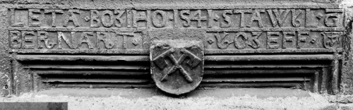 Vysoké Mýto, Dolní mlýn, nejstarší nápis o založení mlýna v Čechách.